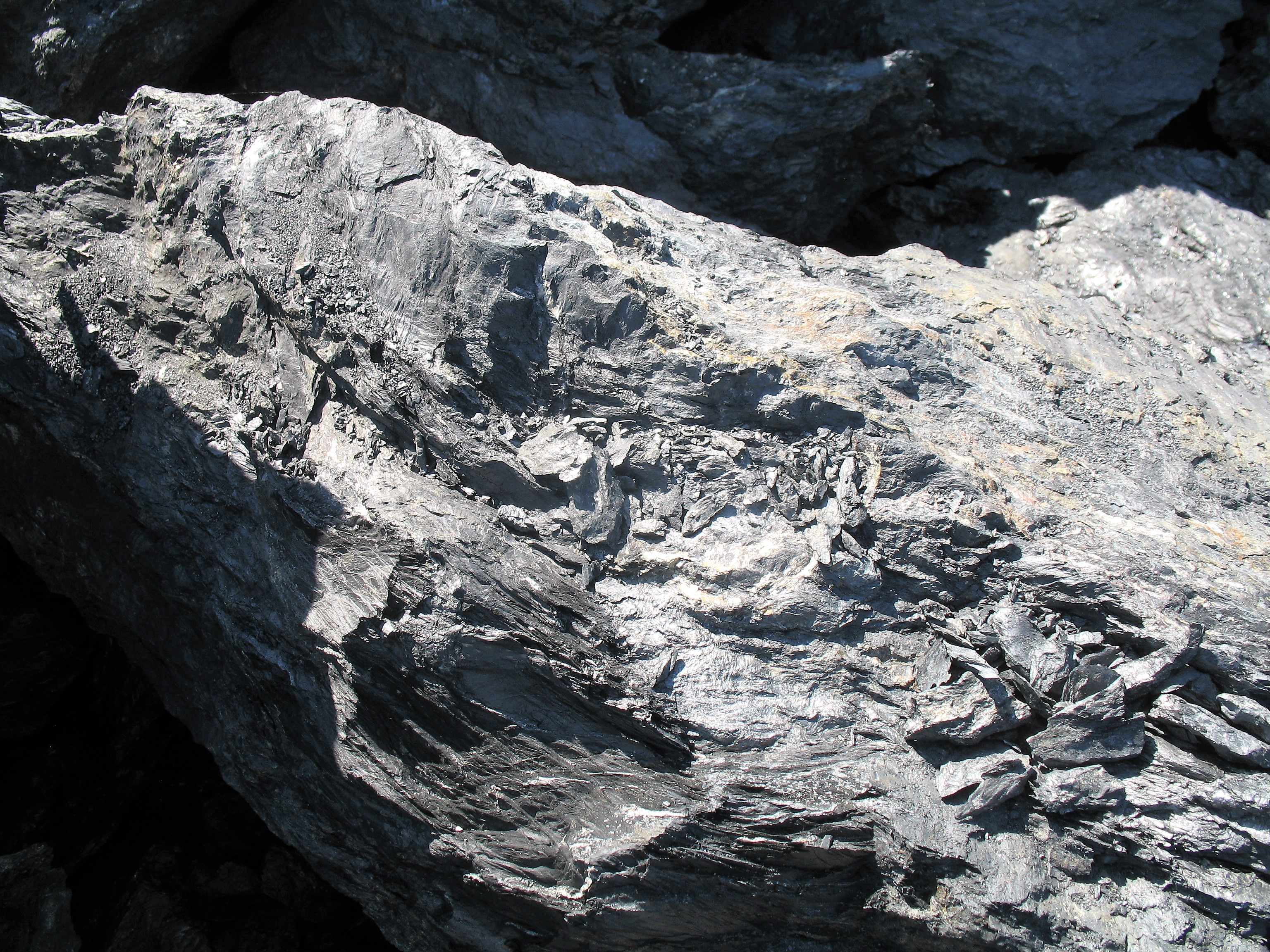 Lom Prachovice, květen 2017. Vápenec s grafitem a pyritem.